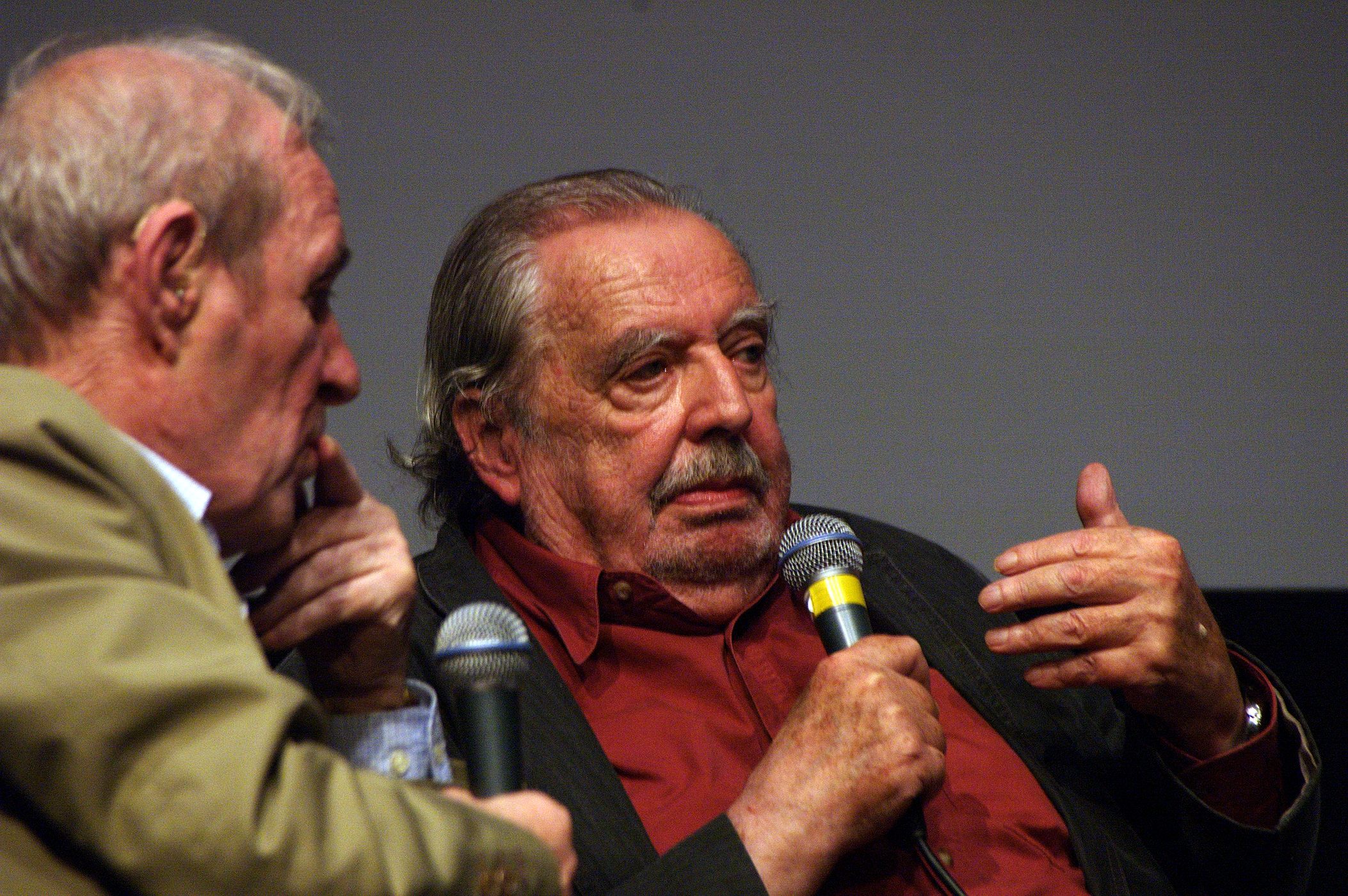 Alain Tanner répondant à André S. Labarthe à la Cinémathèque française lors de la table ronde "Mai 68 a-t-il été filmé ?"